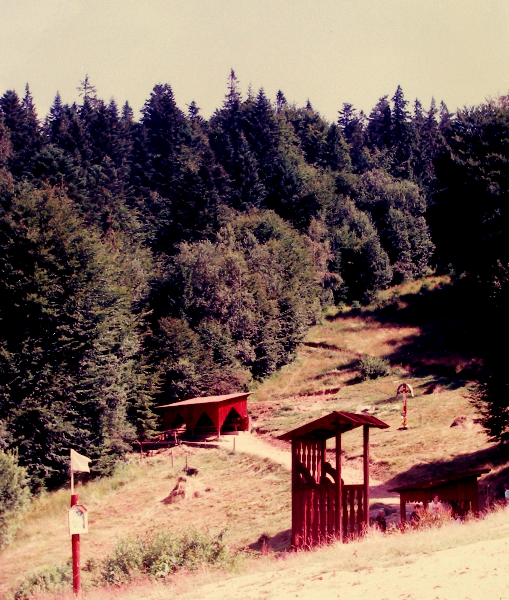 Hora Zvír pri obci Litmanová okres Stará Ľubovňa, rok 1994.